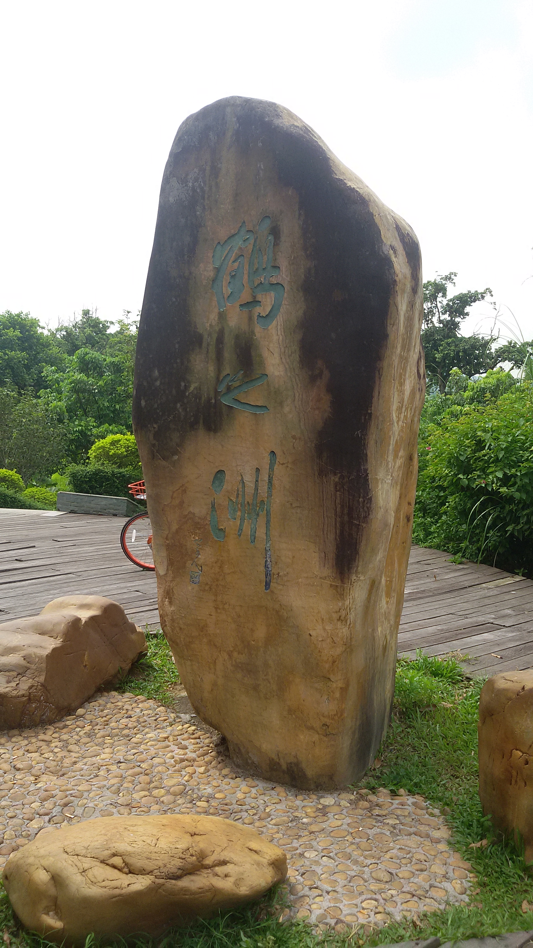 粵語: 鶴之洲濕地公園